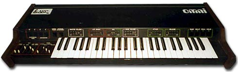 sintetizzatore ARP Omni Mk1 Licensing Categoria:Sintetizzatori Categoria:Sintetizzatori ARP